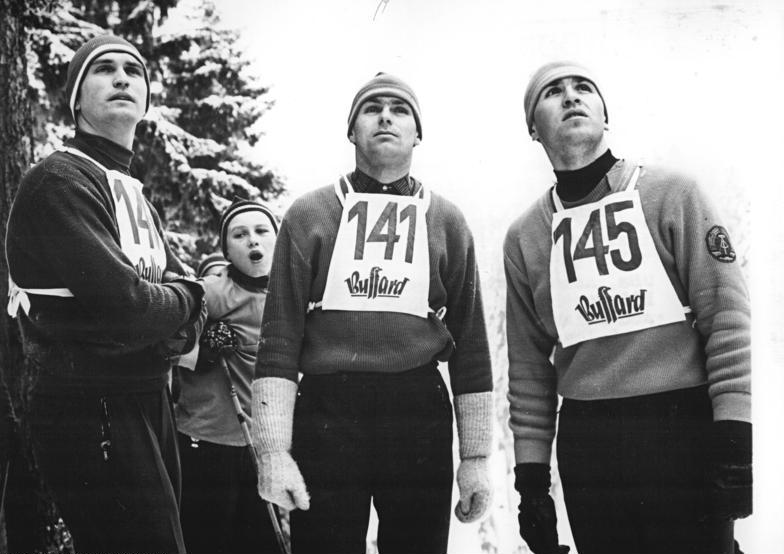 Zentralbild Kohls 26.2.1963 XIV. Deutsche Meisterschaften in den Nordischen Disziplinen Die XIV. Deutschen Meisterschaften in den Nordischen Disziplinen werden vom 20. bis 24. Februar 1963 in Klingenthal-Erzgebirge ausgetragen. UBz: Kombinationssprunglauf: Dietel (SC Dynamo Klingenthal), K.H. Herzer (ASK Vorwärts Brotterode) und Roland Weisspflog (SC Traktor Oberwiesenthal) verfolgen die Sprünge ihrer Konkurrenten (v.l.n.r.).